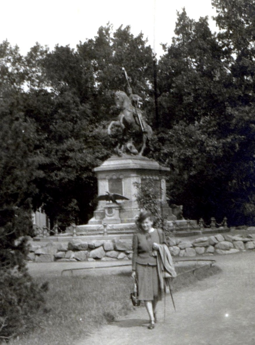 Quedlinburger Siegesdenkmal im August 1940, Ausschnitt, heutiger Friedrich-Ebert-Platz, im Vordergrund Ehefrau des Fotografen Maria Meister, geborene Trimborn (1912-1996)